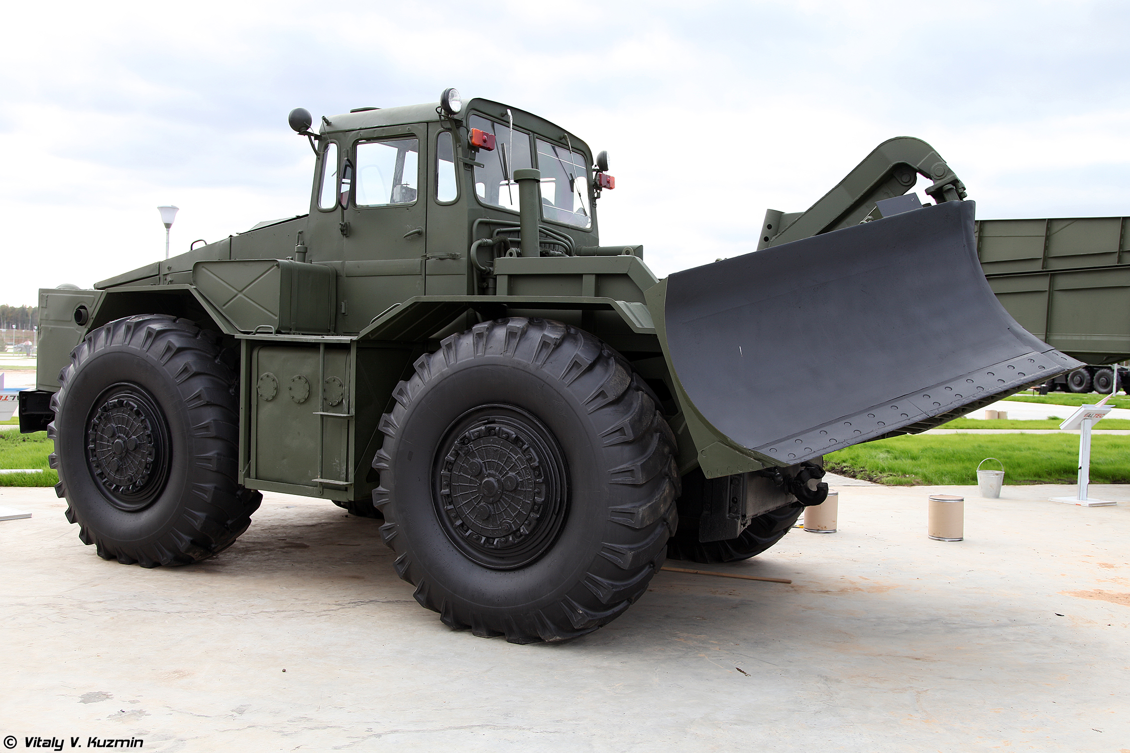 Путепрокладчик ПКТ